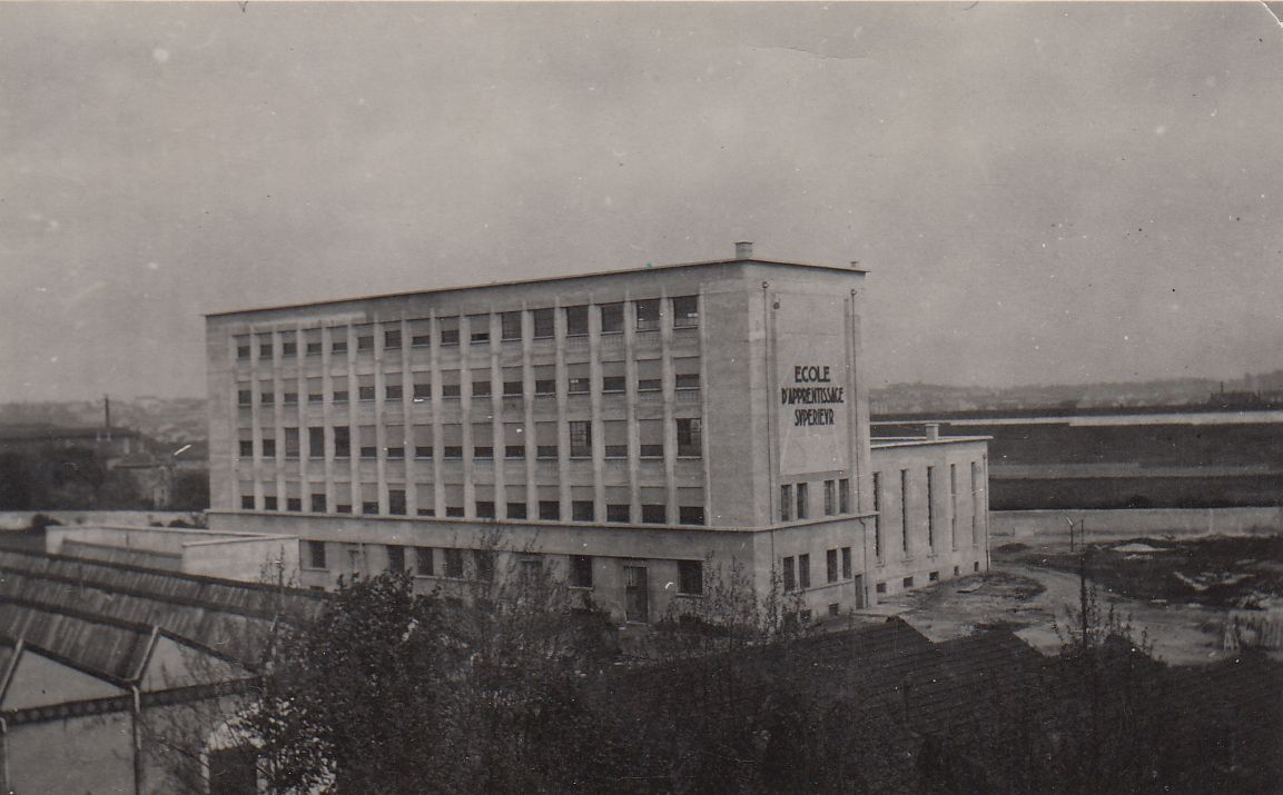 Photo batîment original du Lycée La Mache